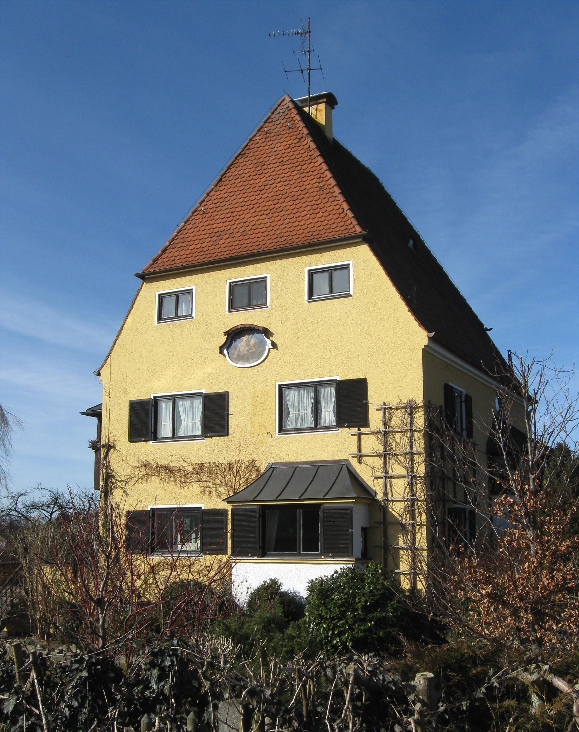 Altenbeuern, Eichendorffstraße 10, Haus Eichendorff, Villa im Stil eines spätmittelalterlichen Edelsitzes mit hohem Halbwalmdach, um 1910 erbaut